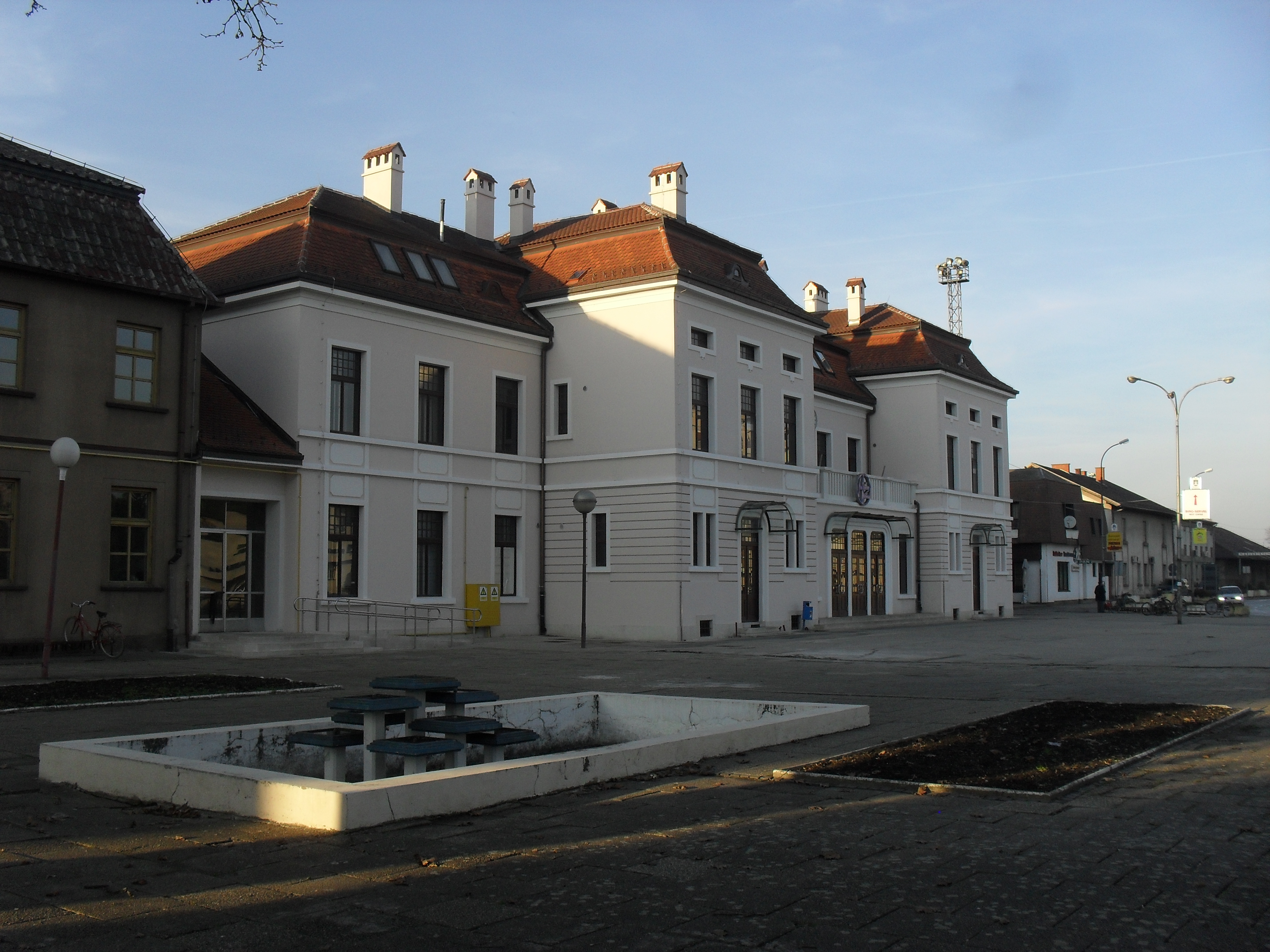 Koprivnica kolodvor